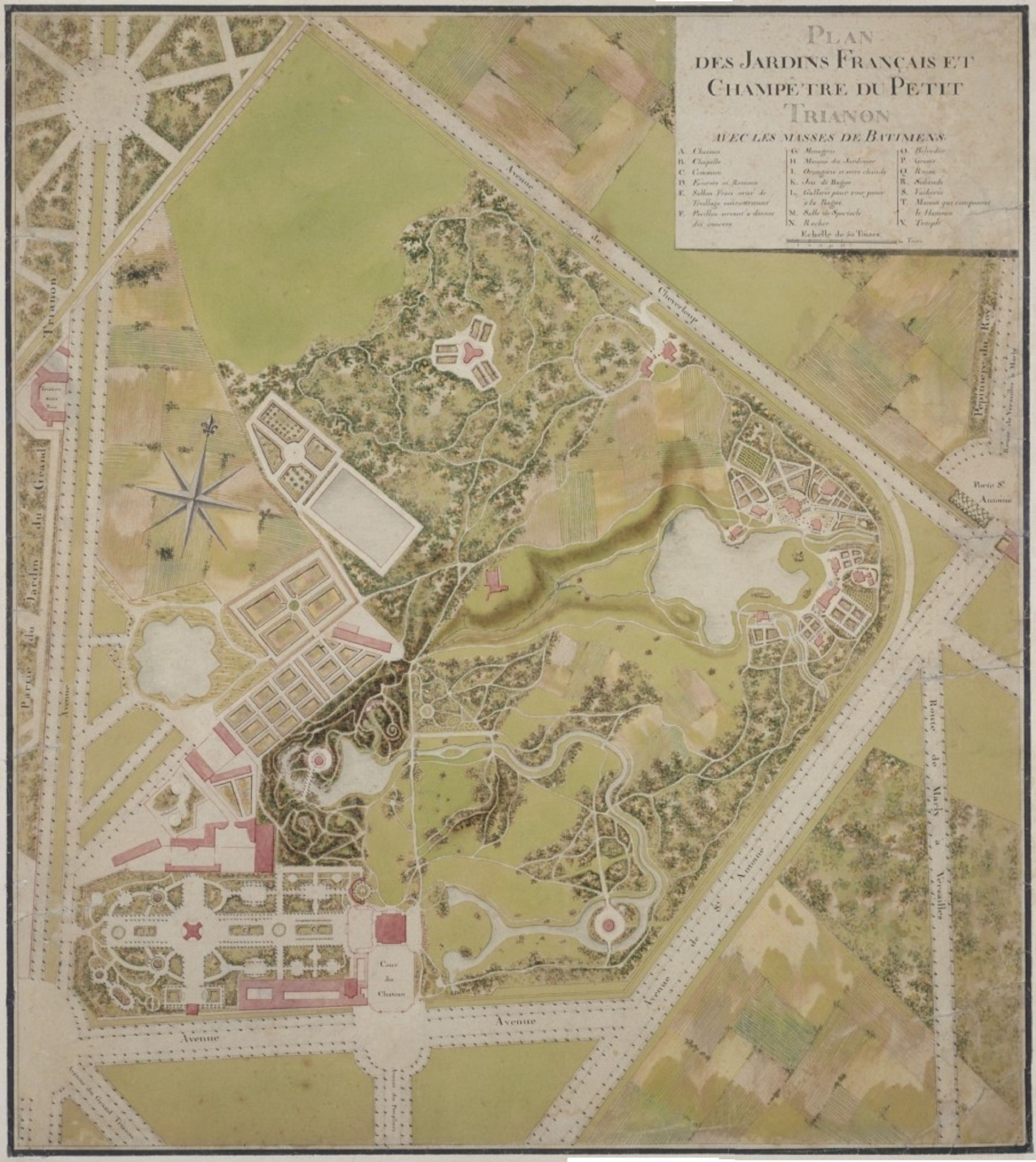 Plan des jardins français et champêtre du Petit Trianon